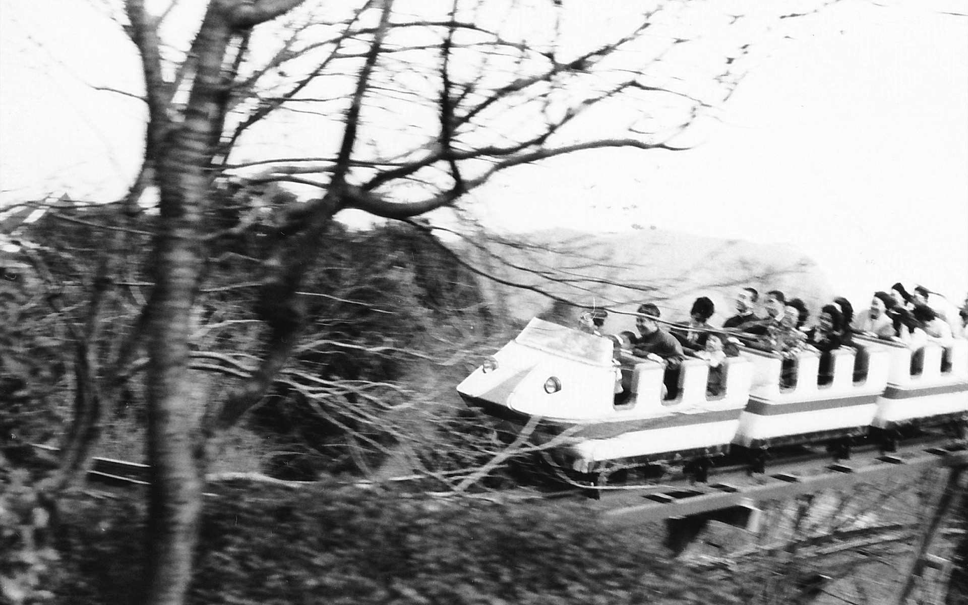 ラクテンチのジェットコースター（1970年代）